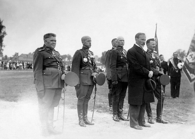 Lietuvos Respublikos Prezidentas Antanas Smetona Tauragės dvare III dragūnų Geležinio vilko pulkui 1937 metų rugpjūčio 15 dieną įteikia vėliavą. Iš kairės: vidaus reikalų ministras Julius Čaplikas, kariuomenės vadas Stasys Raštikis, krašto apsaugos ministras Stasys Dirmantas, prezidentas Antanas Smetona, brigados generolas Kazys Tallat-Kelpša.